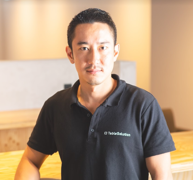 谷口 優氏の写真。株式会社TableCheckオフィス内にて撮影